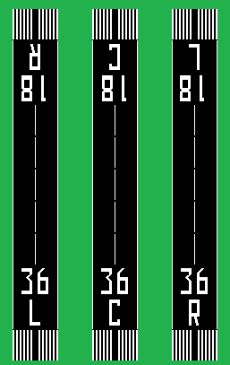 De drie noord-zuid banen (36-18) op Amsterdam Airport Schiphol, met de toevoegingen L(eft), C(enter) en R(right)